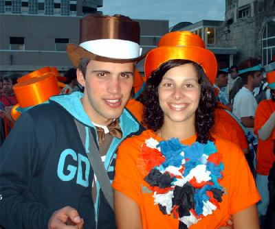 Estudantes finalistas do ensino superior durante o cortejo da Queima-das-Fitas.